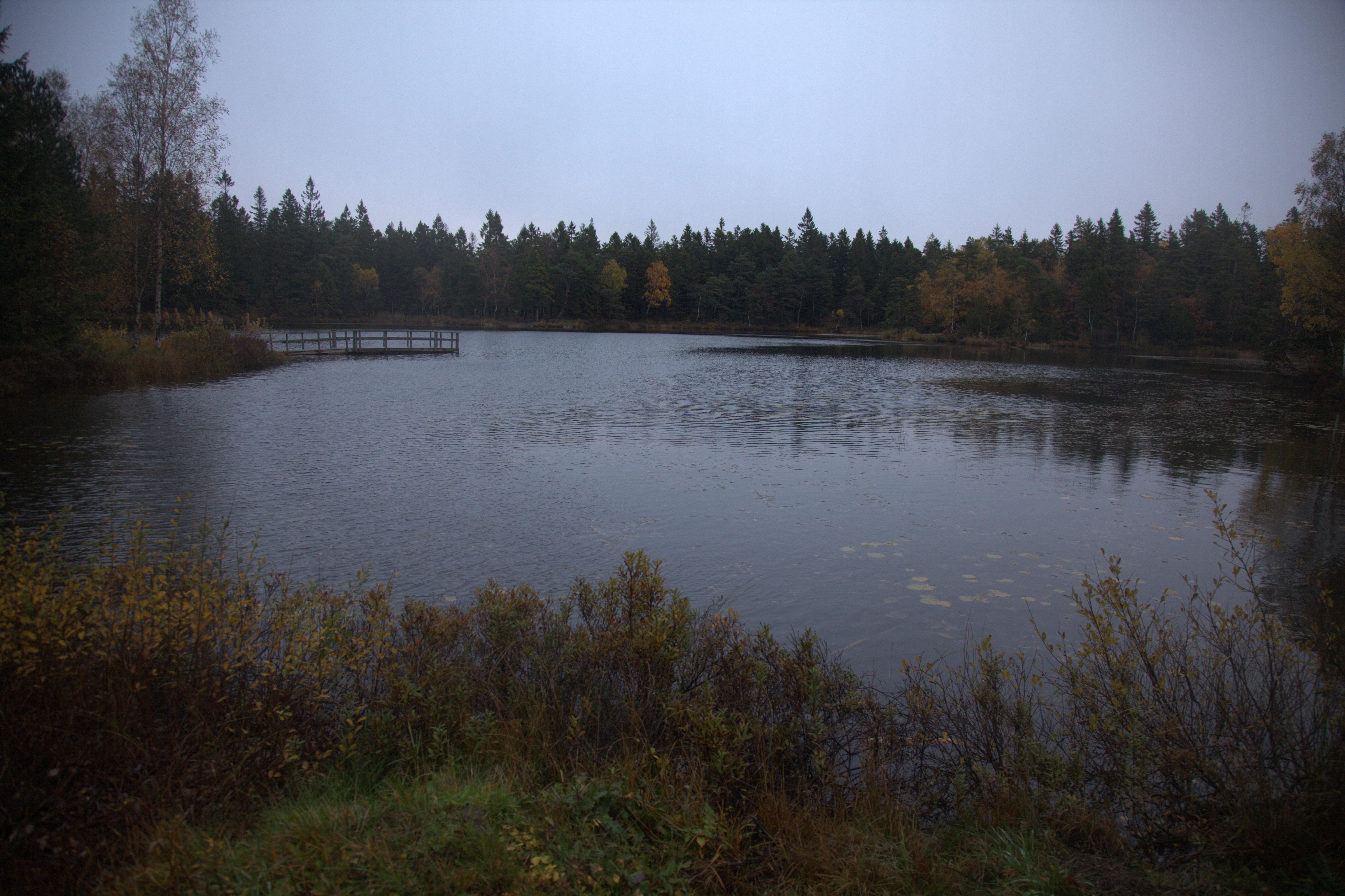 Klarevatten i Kungälvs kommun